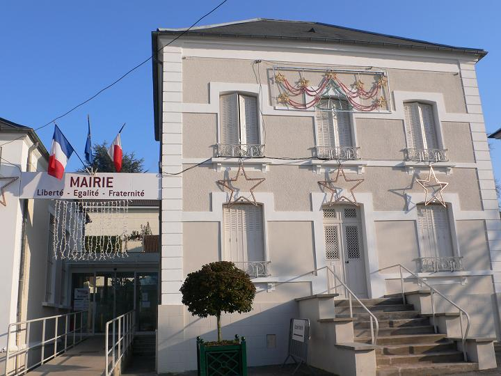 Brétigny-sur-Orge : Mairie